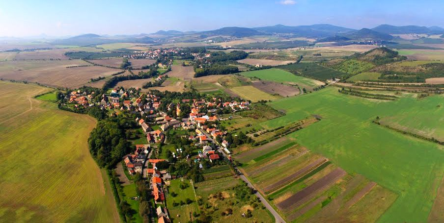 Letecký pohled na Solany